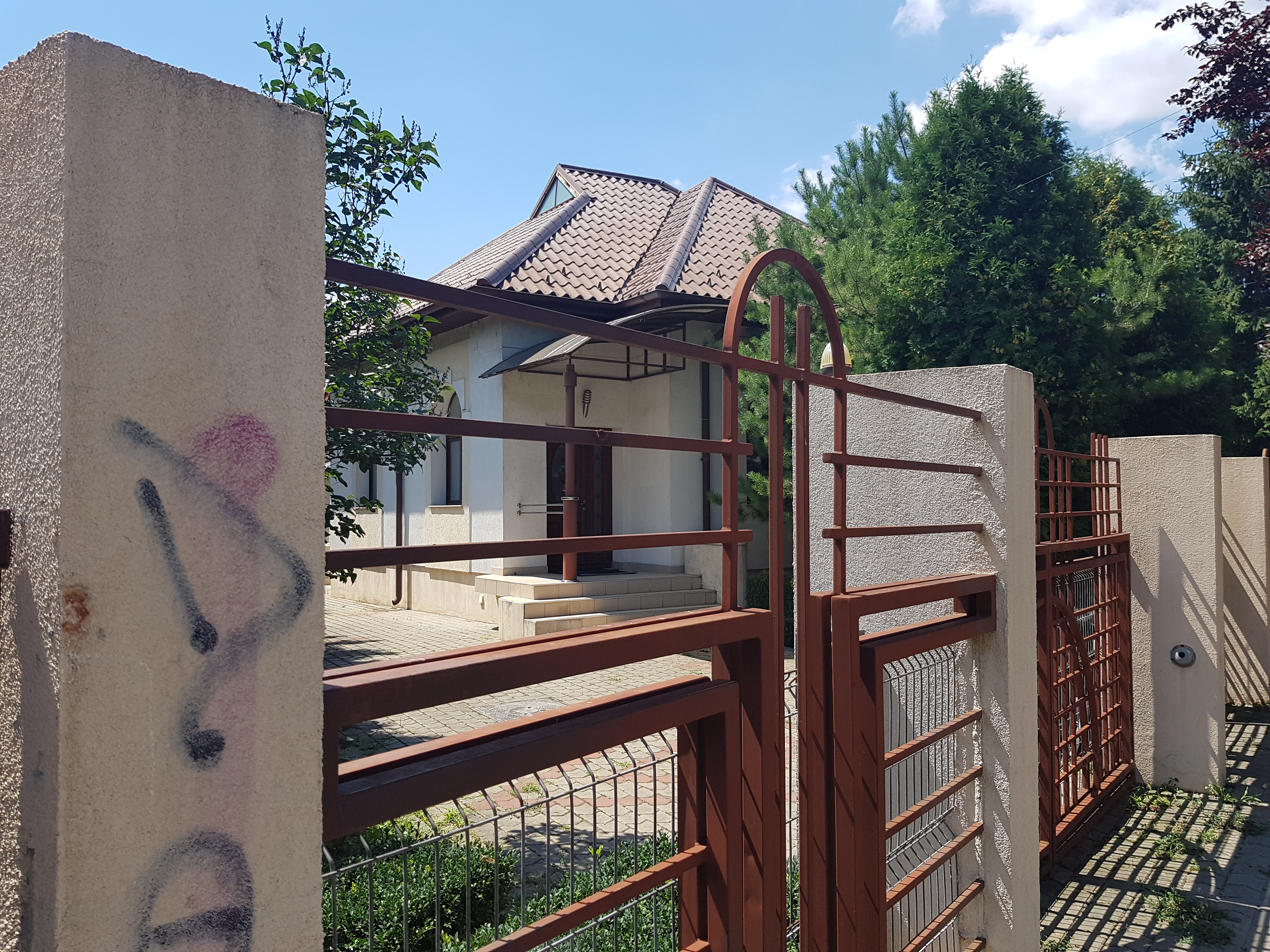 Casa Eliade Holban